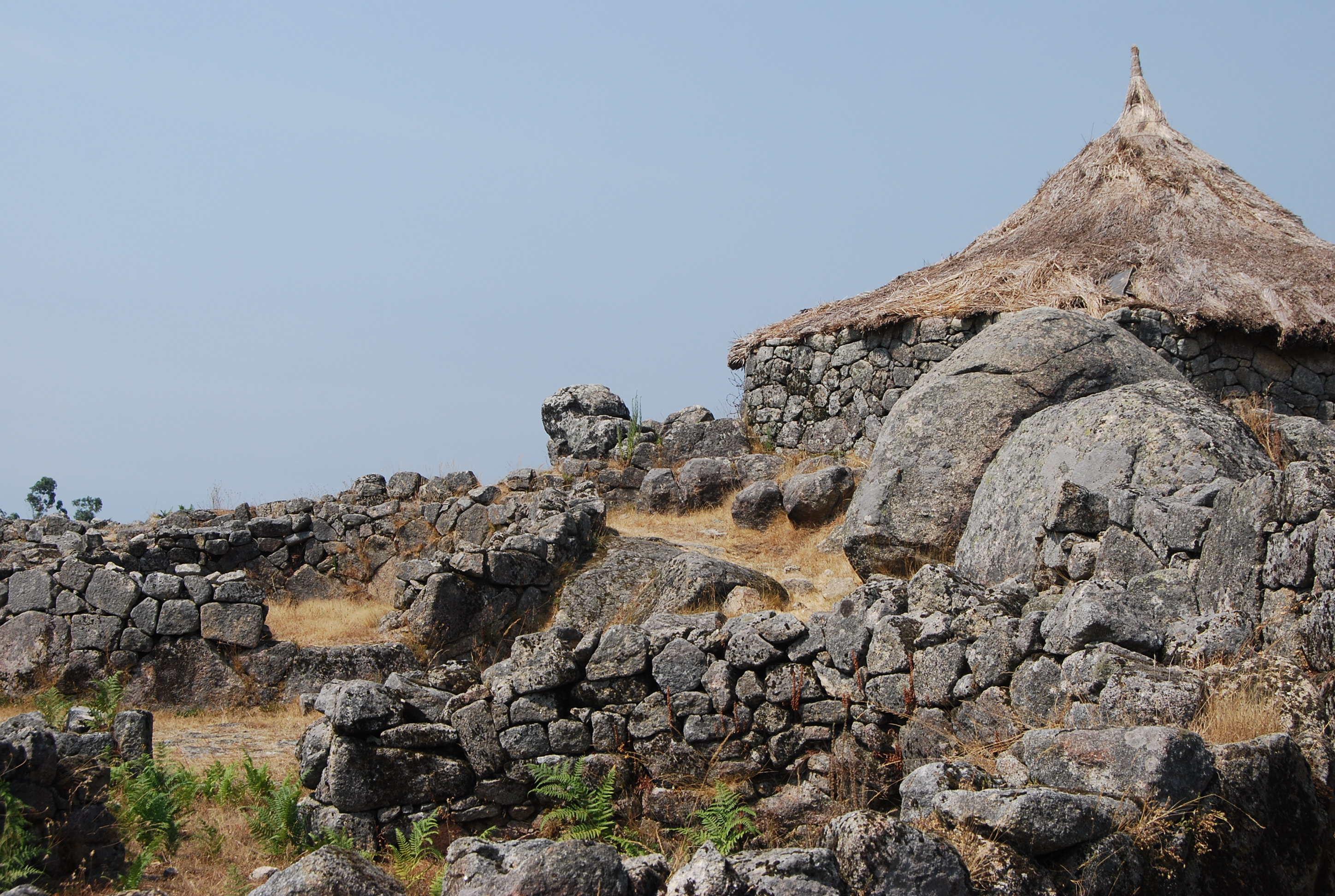 Citânia de Sanfins - pormenor This file was uploaded for Wiki Loves Monuments in Portugal with the unique identifier 70495.